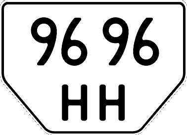 Номерной знак для тракторов Украины, стандарт 1992 года